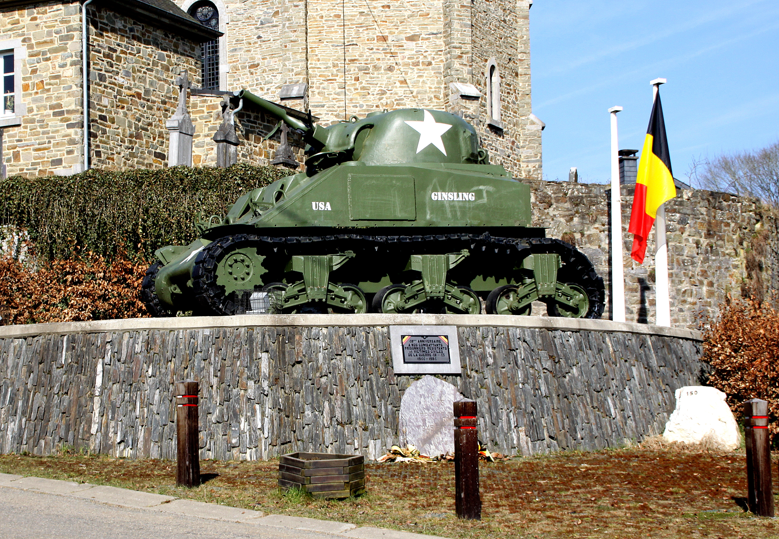 Sherman zu Wibrin bei der Kierch